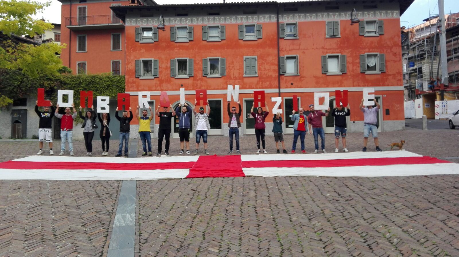 Coreografia per l'indipendenza della Lombardia